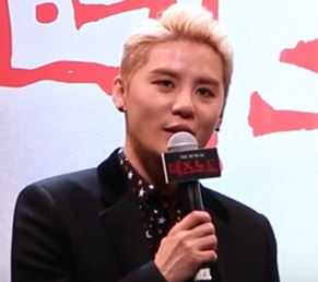 [TV10] 12월 19일 뮤지컬 '데스노트' 제작발표회 현장